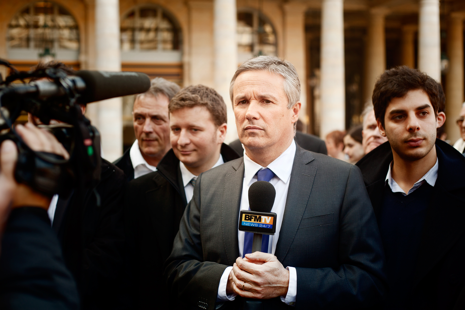 Dépôt des 750 parrainages au Conseil Constitutionnel en 2012